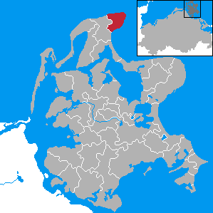 Putgarten, Landkreis Rügen, Mecklenburg-Vorpommern